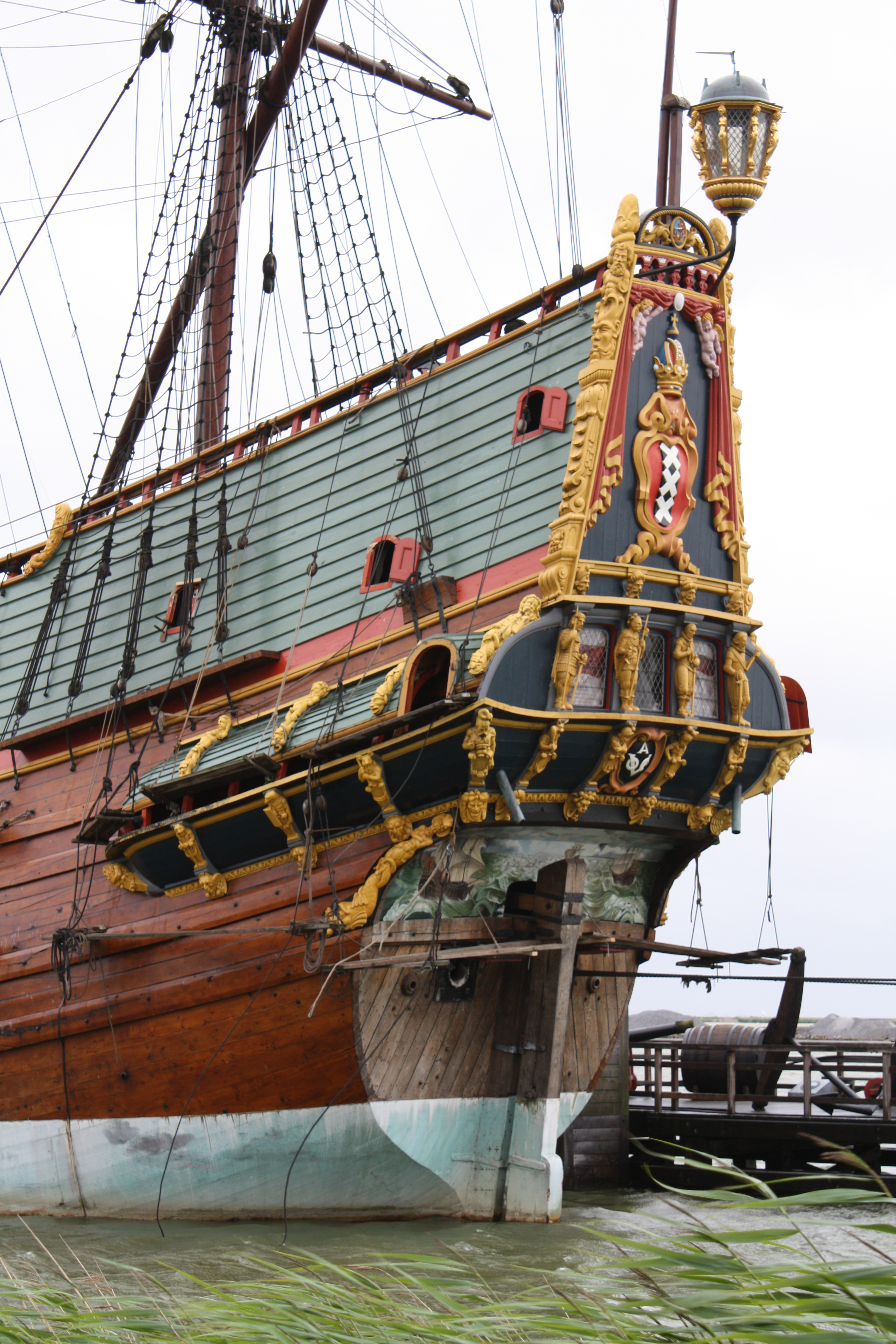 Seitentasche/Seitengalerie des niederländischen Ostindienfahrers BATAVIA (Nachbau)